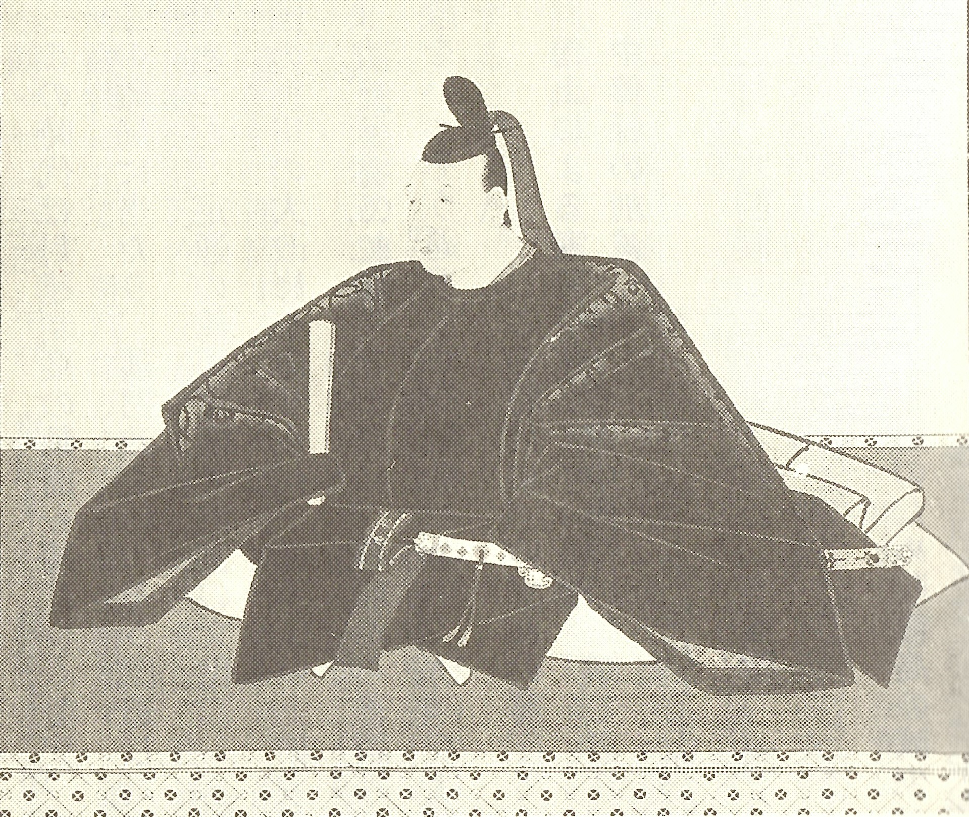 松平定通の肖像。